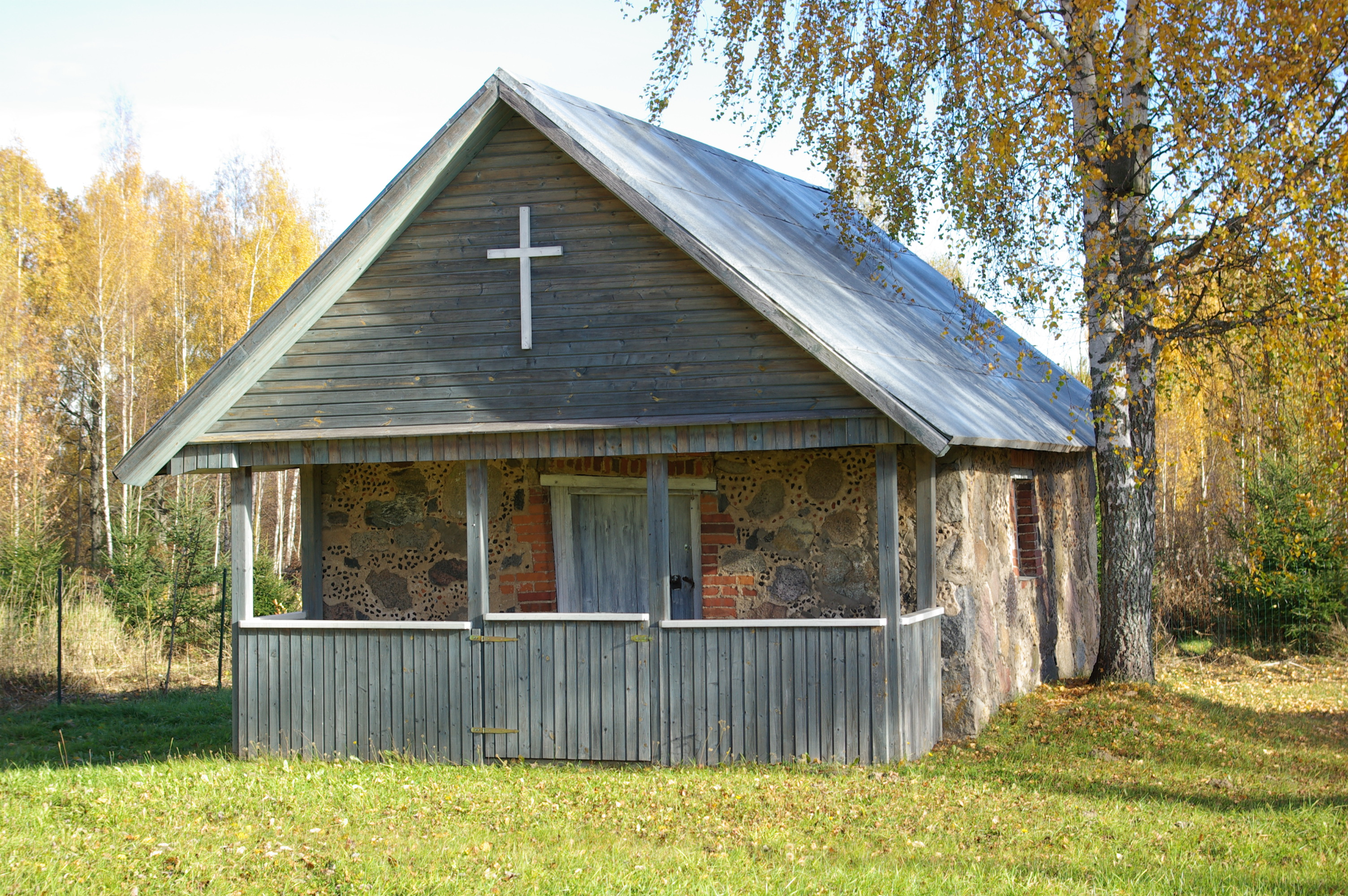 Pelsi kivitsässon